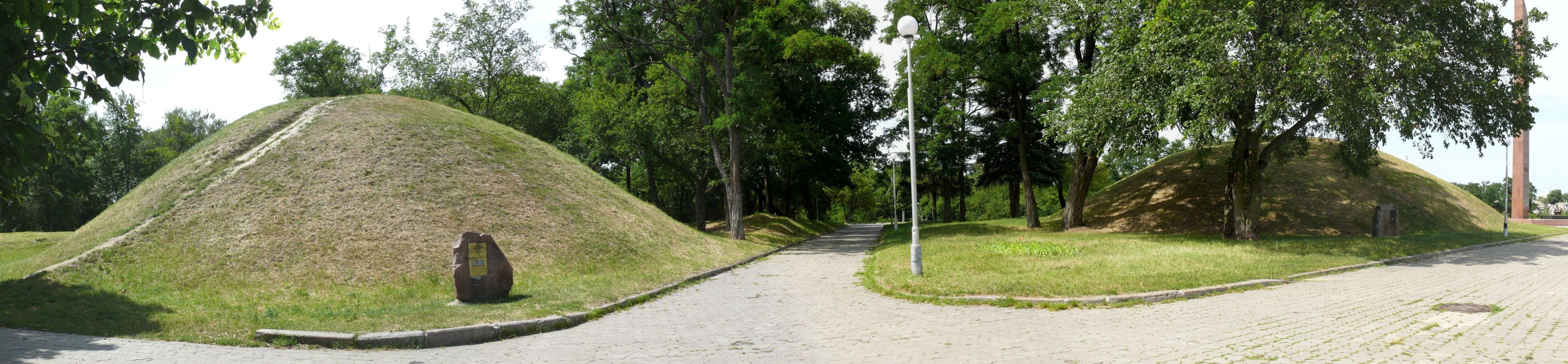 Курганы Безымянный (справа) и Гульбище (слева). Болдины горы. Чернигов. Украина.